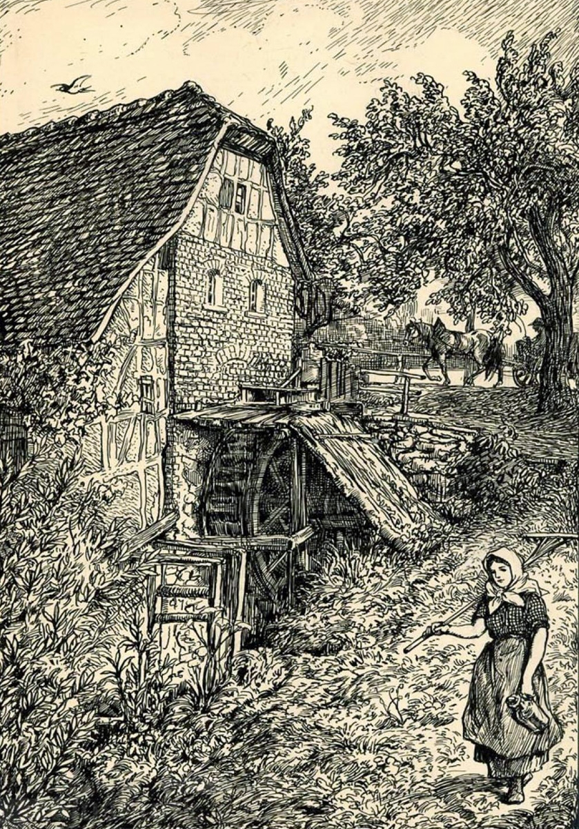 Die Mühle in Rödgen auf einer Tuschezeichnung von Arthur Michaelis